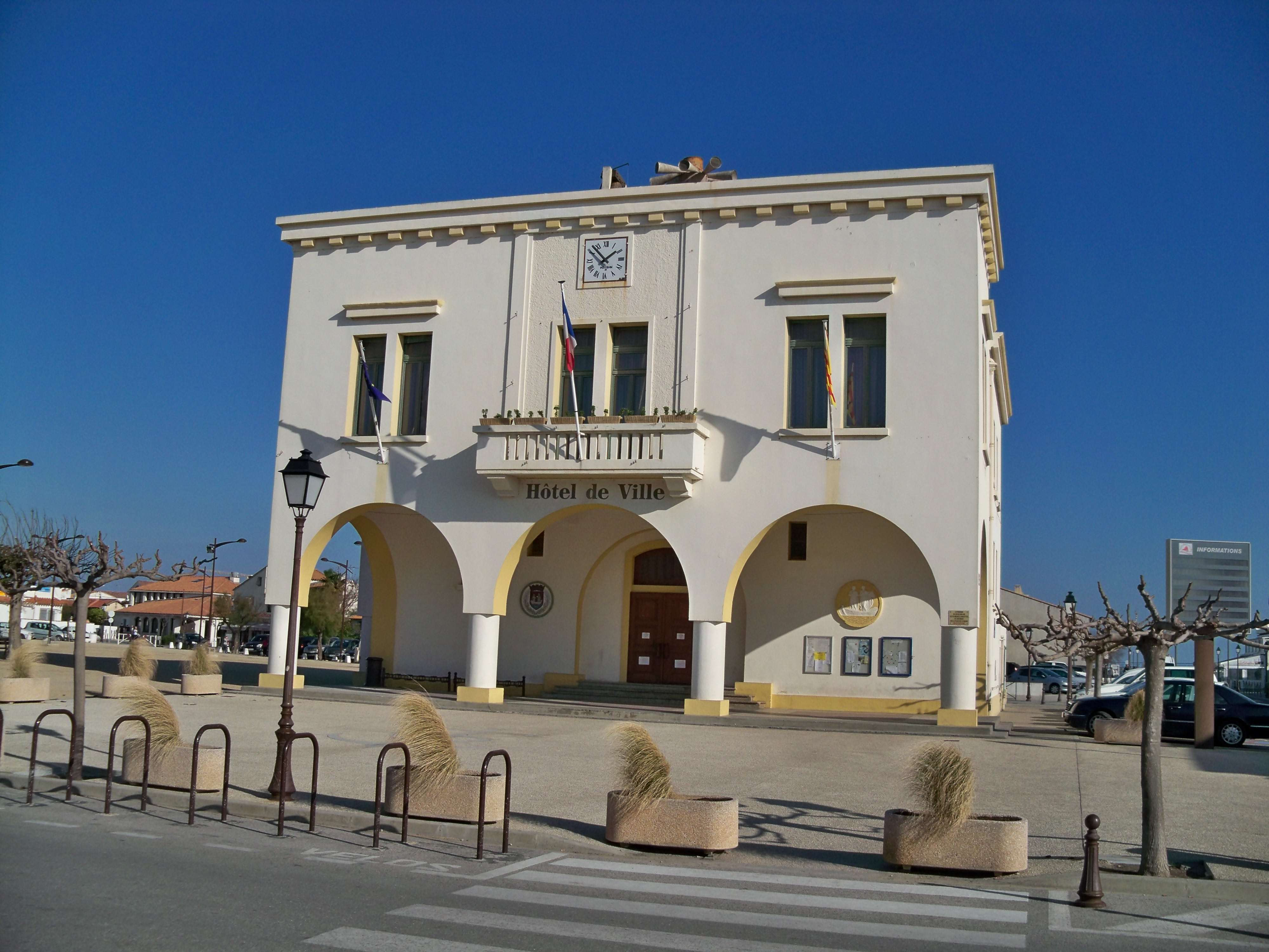 Mairie des Saintes Maries de la Mer (13)